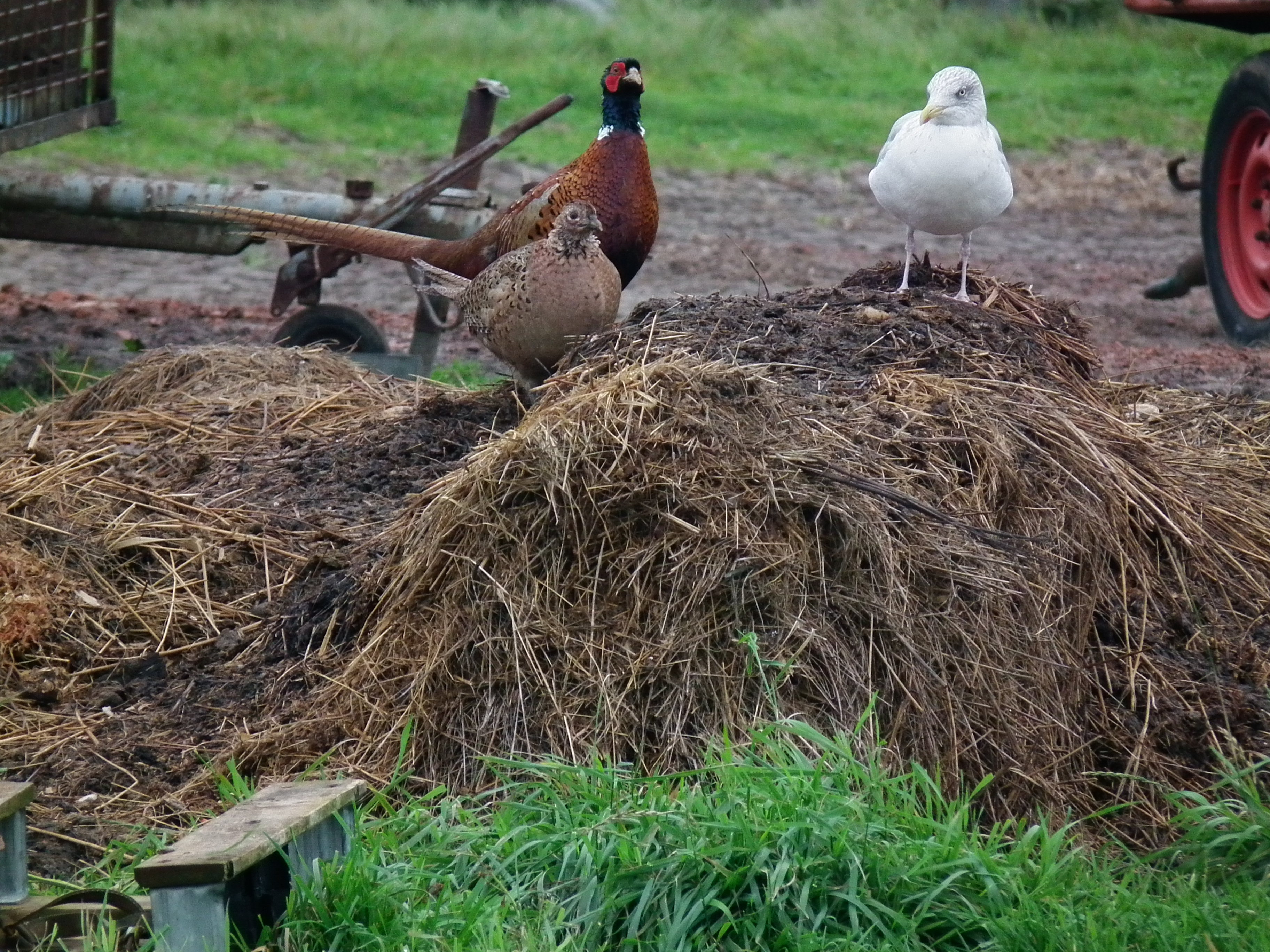 Männlicher Jagdfasan mit Henne (Phasianus colchicus) sowie Silbermöwe (Larus argentatus) auf einem Misthaufen an der Domäne Loog auf der ostfriesischen Nordseeinsel Juist (Niedersachsen, Deutschland)